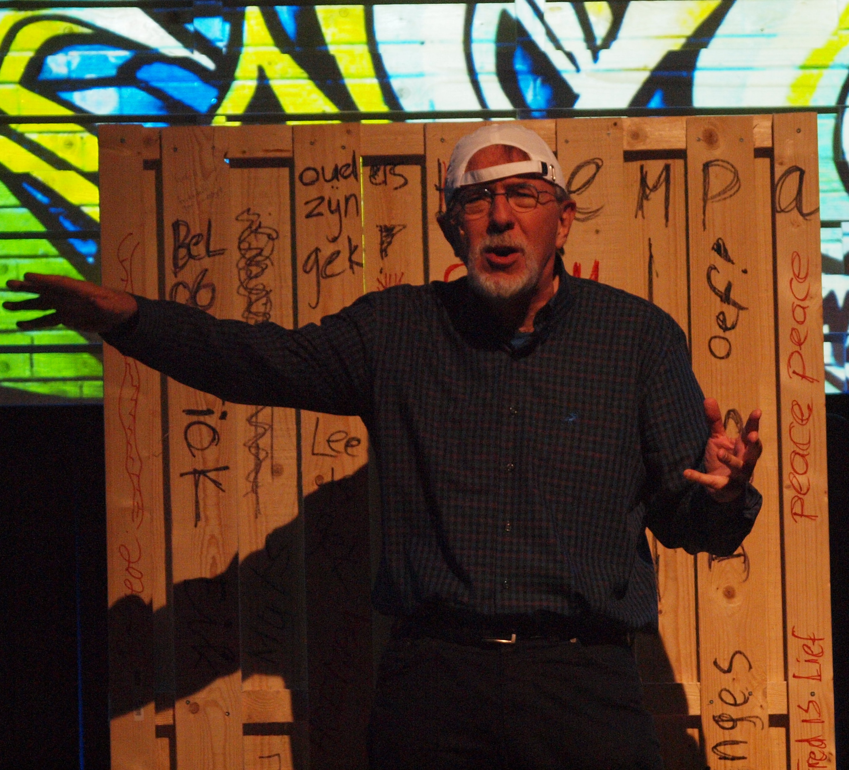 Met Jacques Vriens